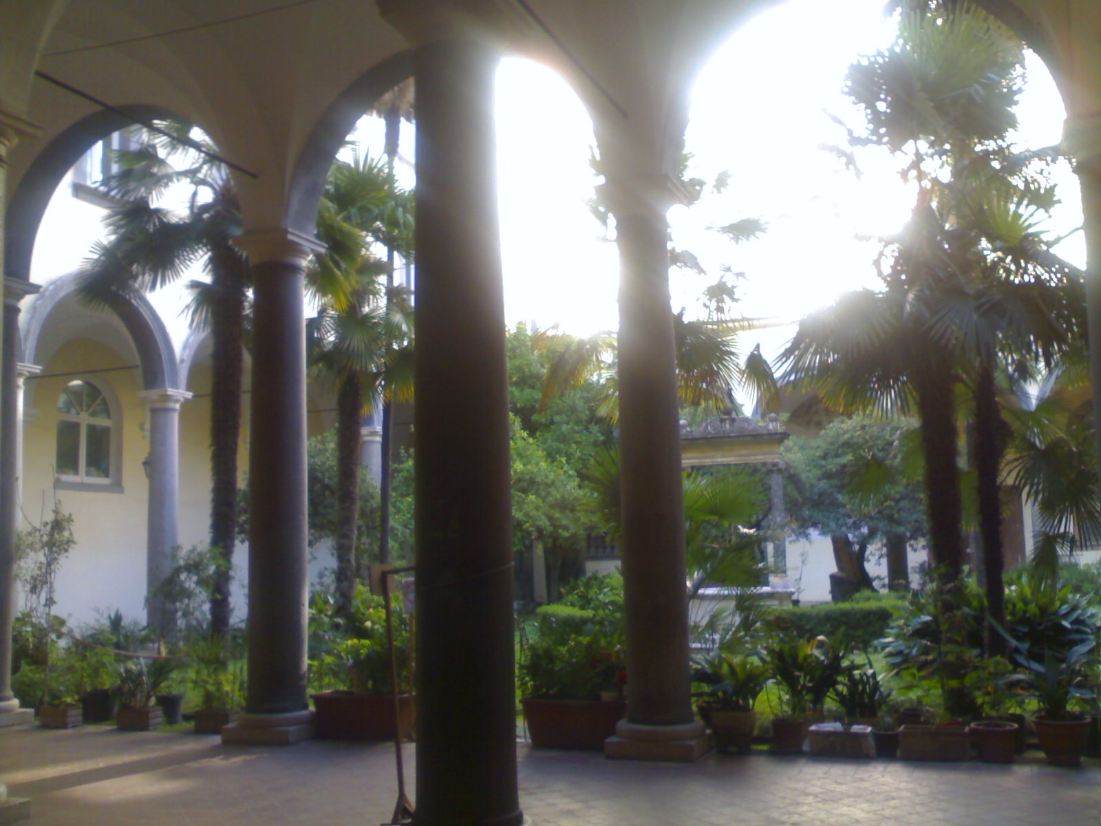 Archivio Notarile (Napoli)